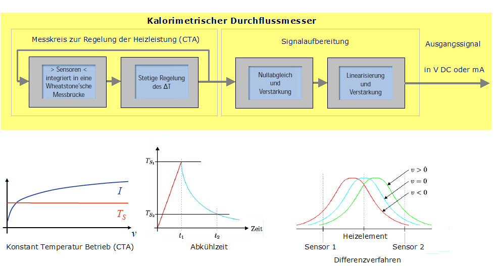 Mess- Regelkreis und Signalaufbereitung Kalorimetrischer Durchflussmesser